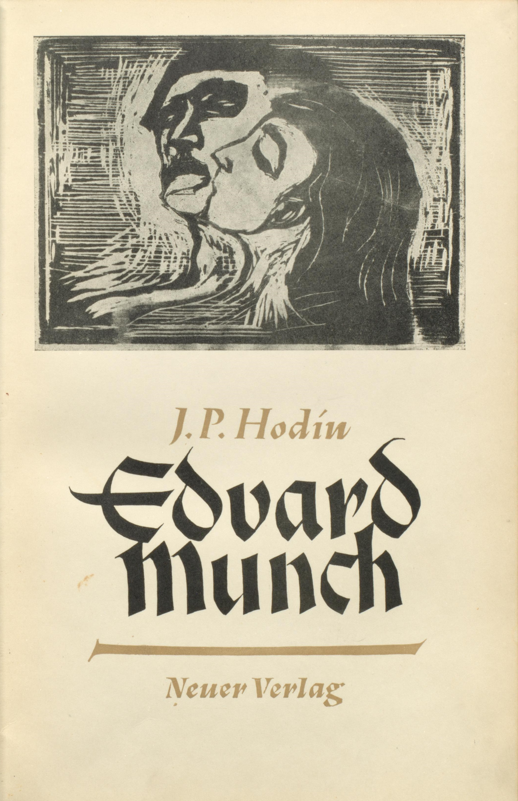 J. P. Hodin Edvard Munch : der Genius des Nordens. Stockholm: Neuer Verlag, 1948 Einband